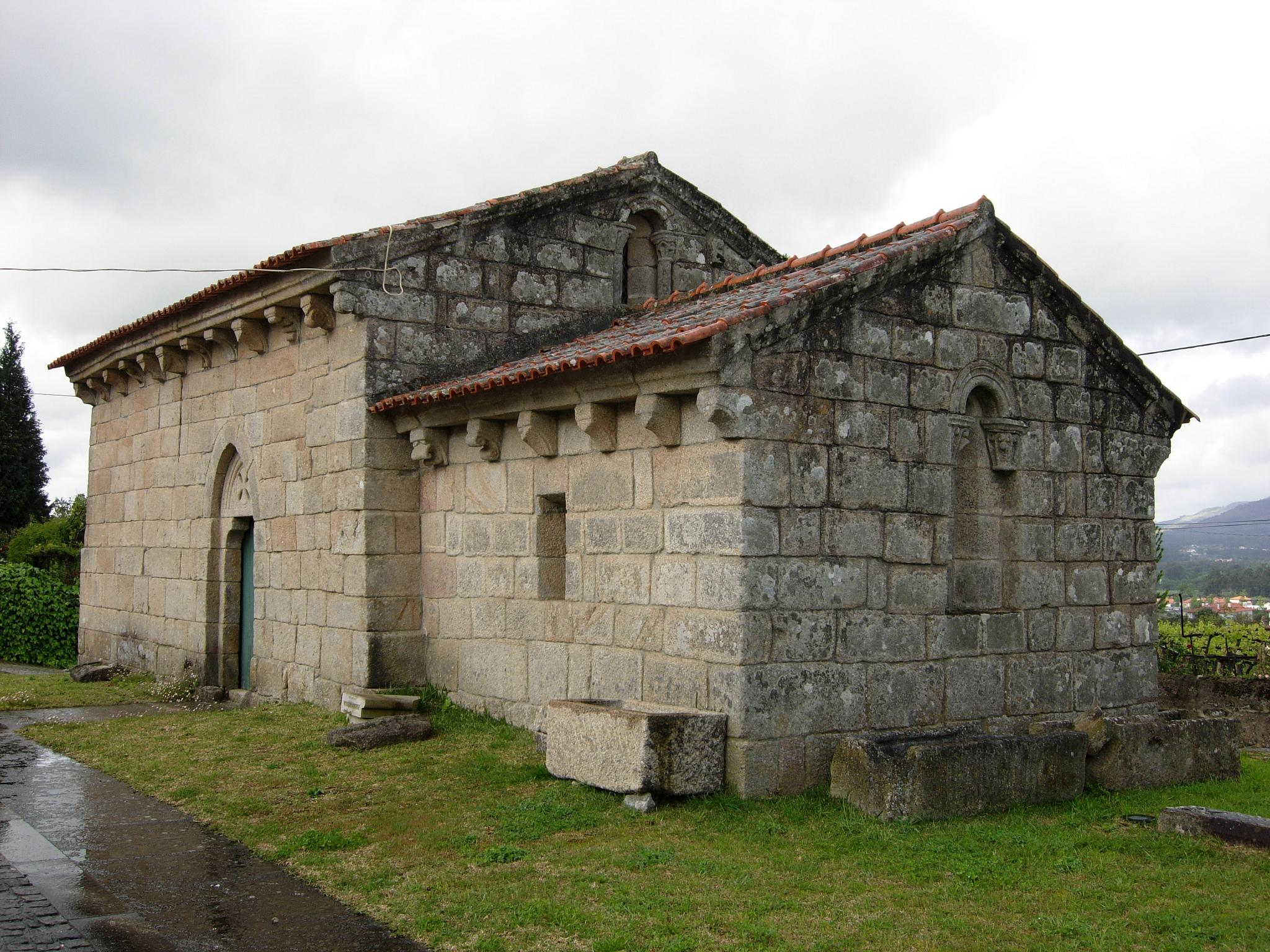 Capilla de Santo Abdão da Correlhã